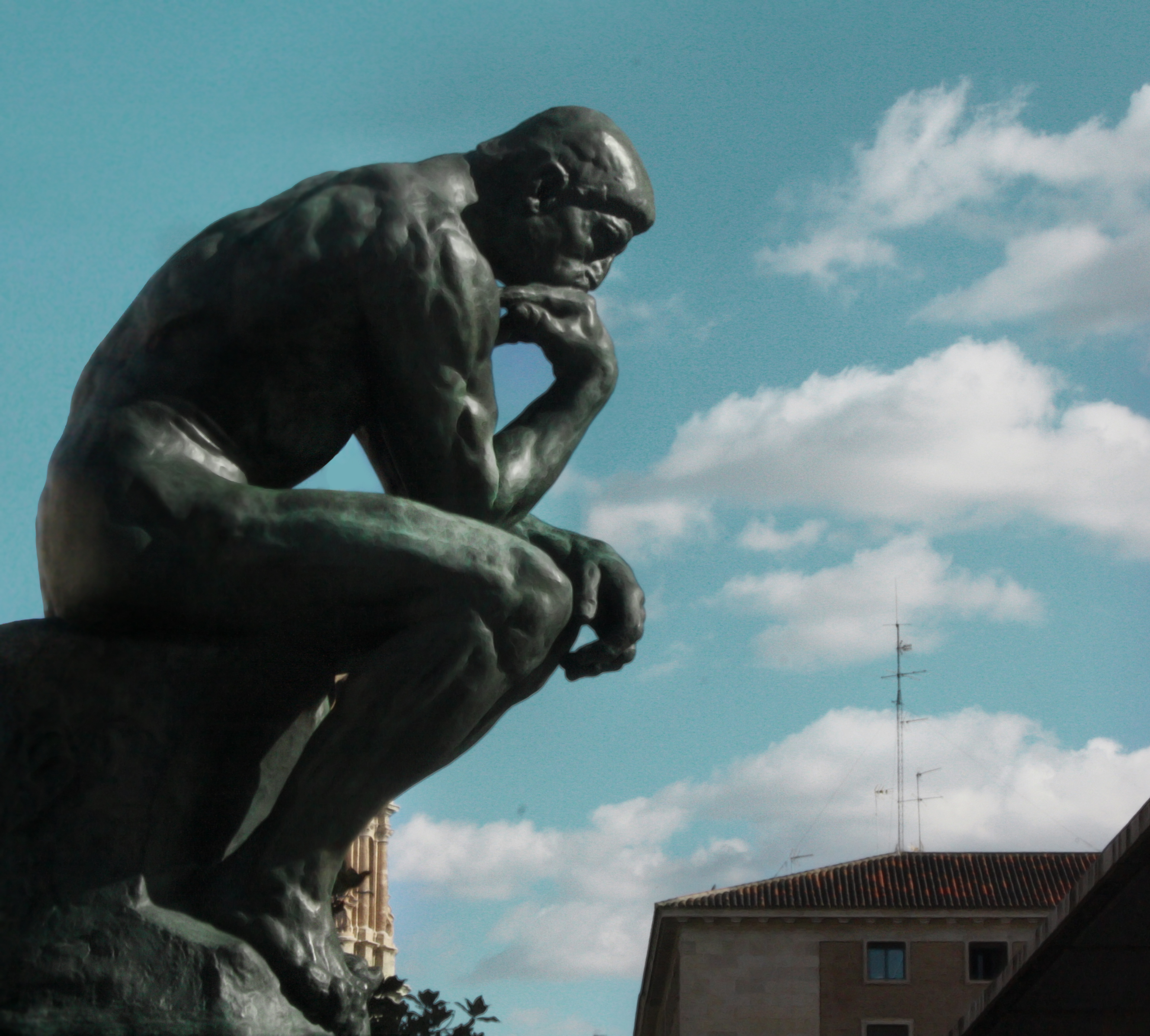 Zaragoza, España